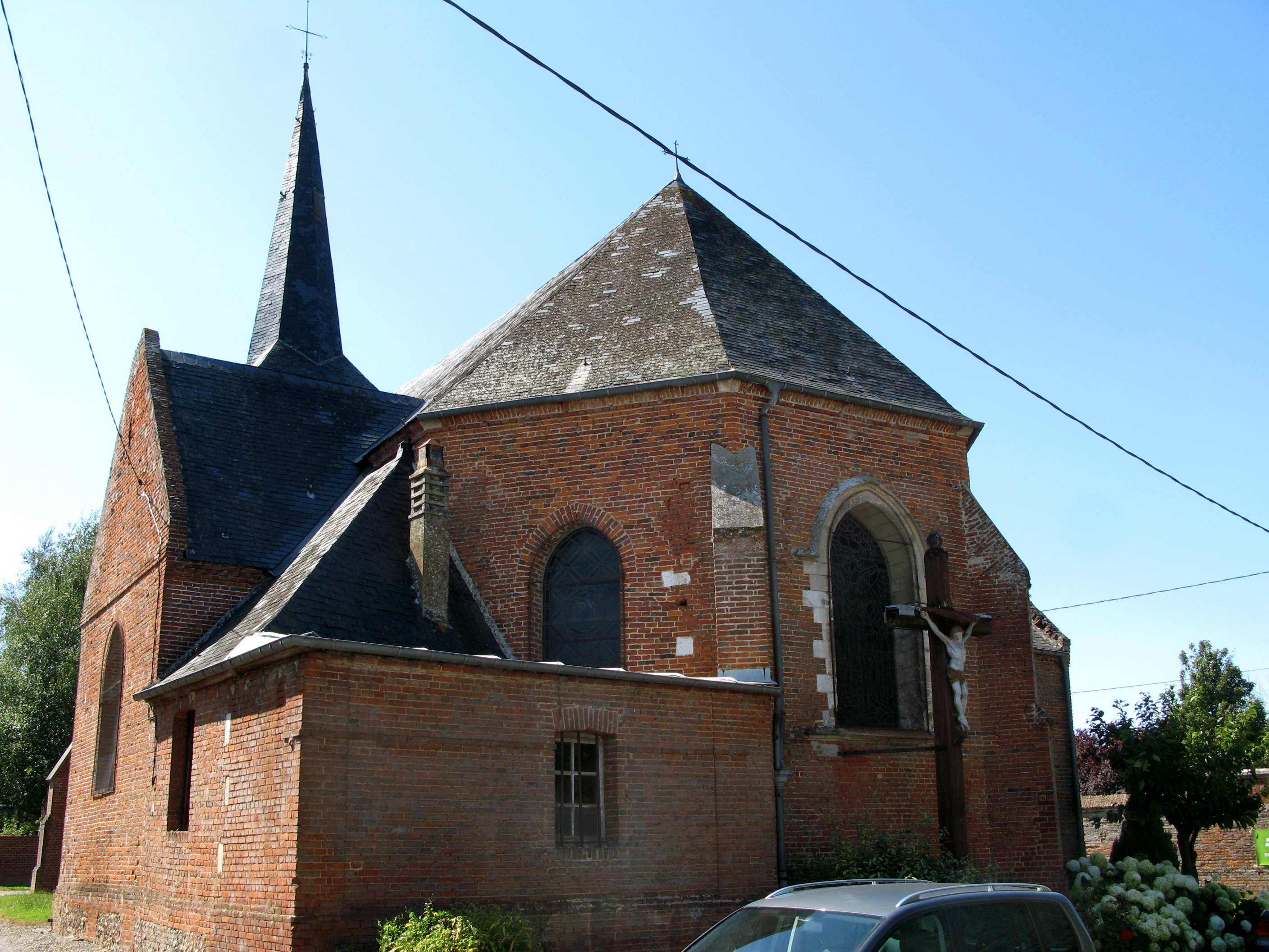 Beaucamps-le-Jeune (Somme, France) - L'église. .